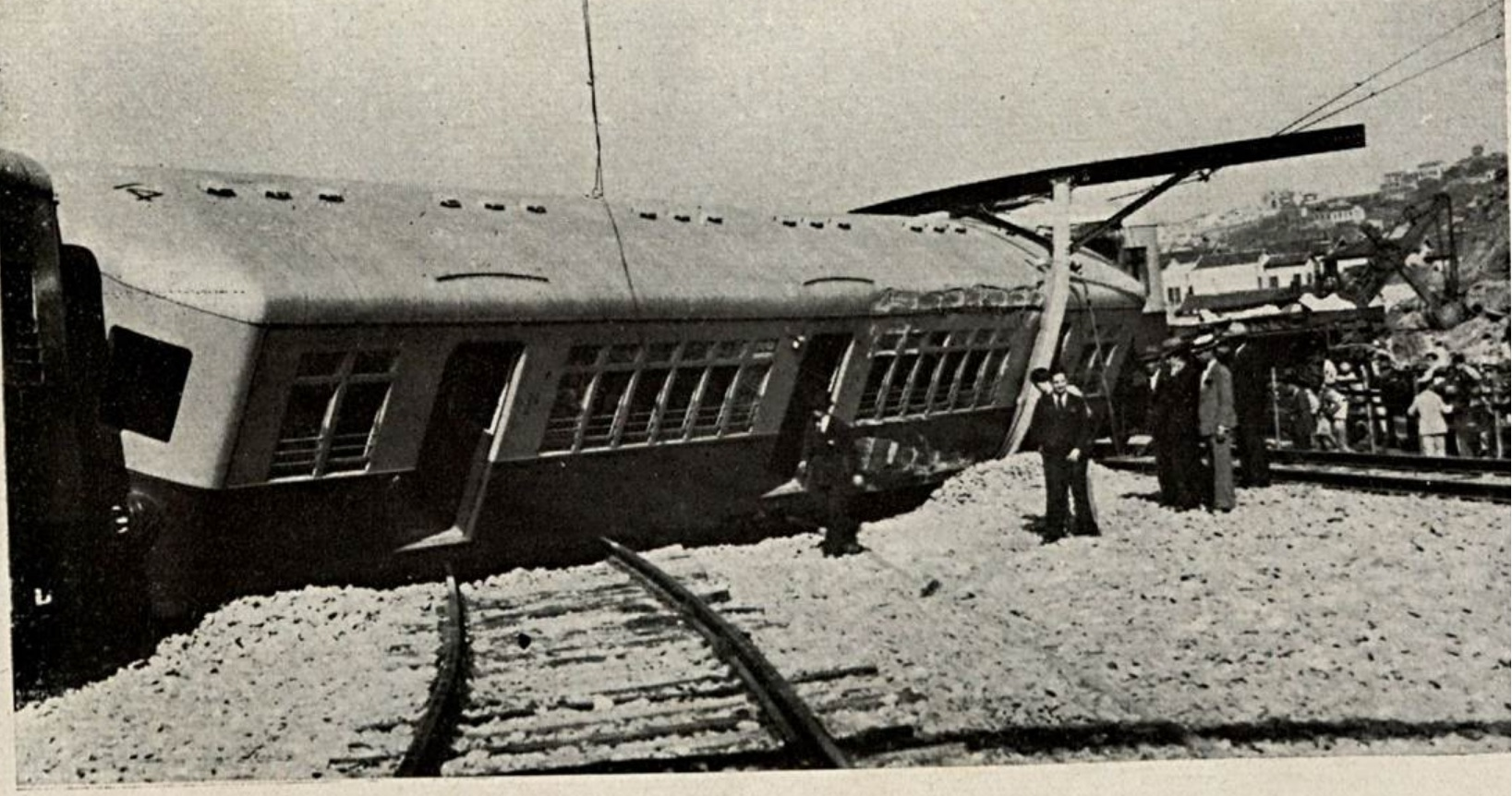 Imagem do descarrilamento ocorrido com um trem da Série 100 em 25 de março de 1938.